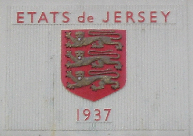 Nrf: Armueûthies d'Jèrri sus l'bâtisse 1937 d'l'aéroport dé Jèrri, Saint Pièrre